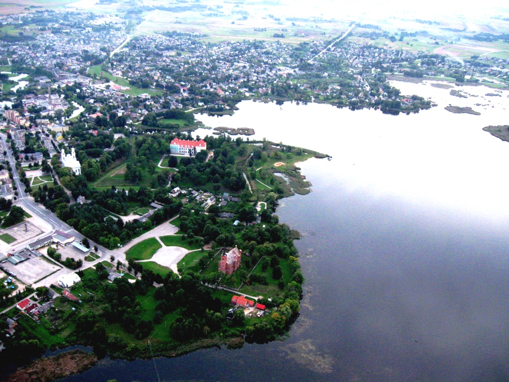 Biržai. Fotografuota 2009-09-08. Autorius aš.